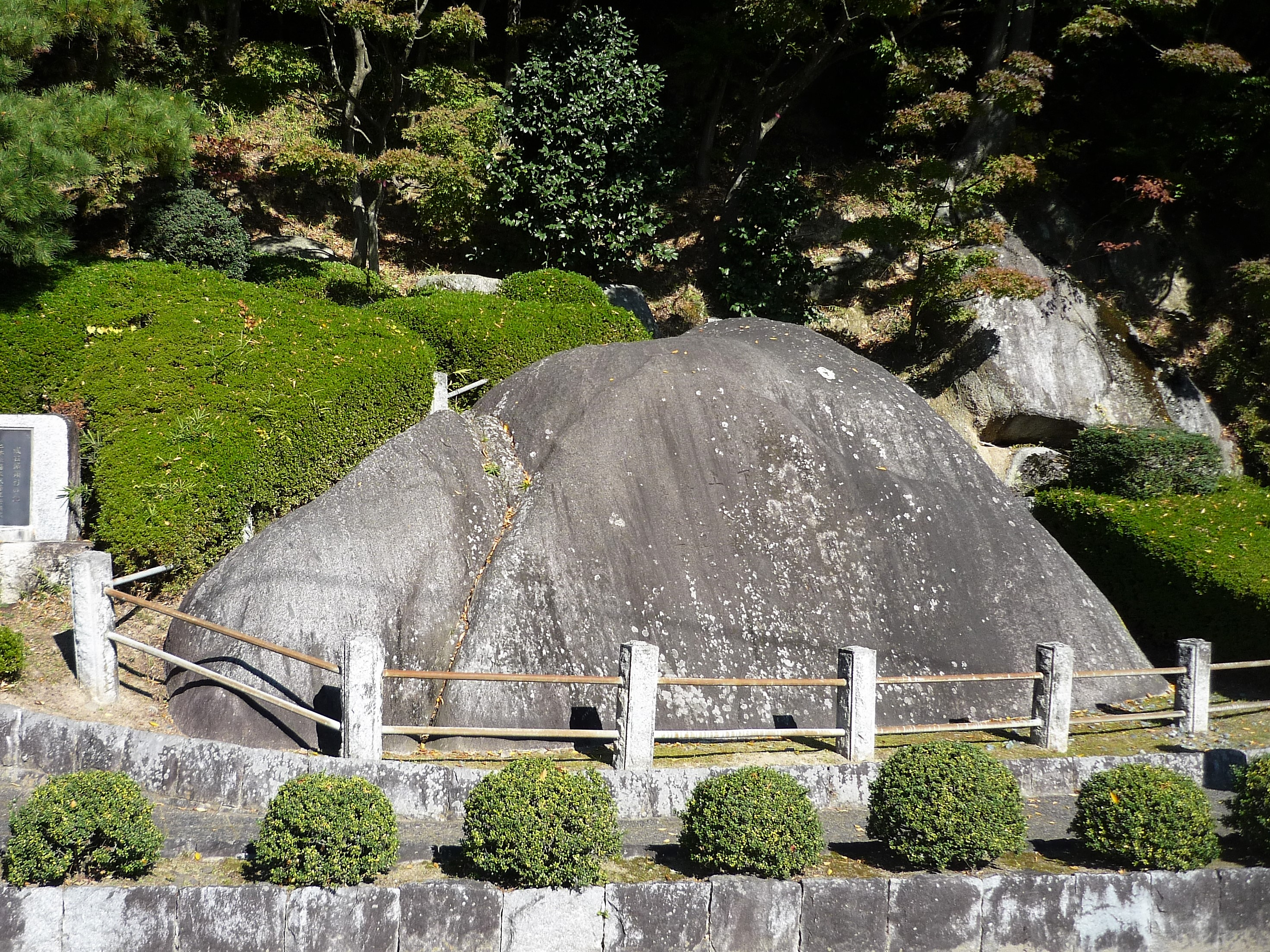 旧二本松藩戒石銘碑 Panasonic Lumix DMC-FS3